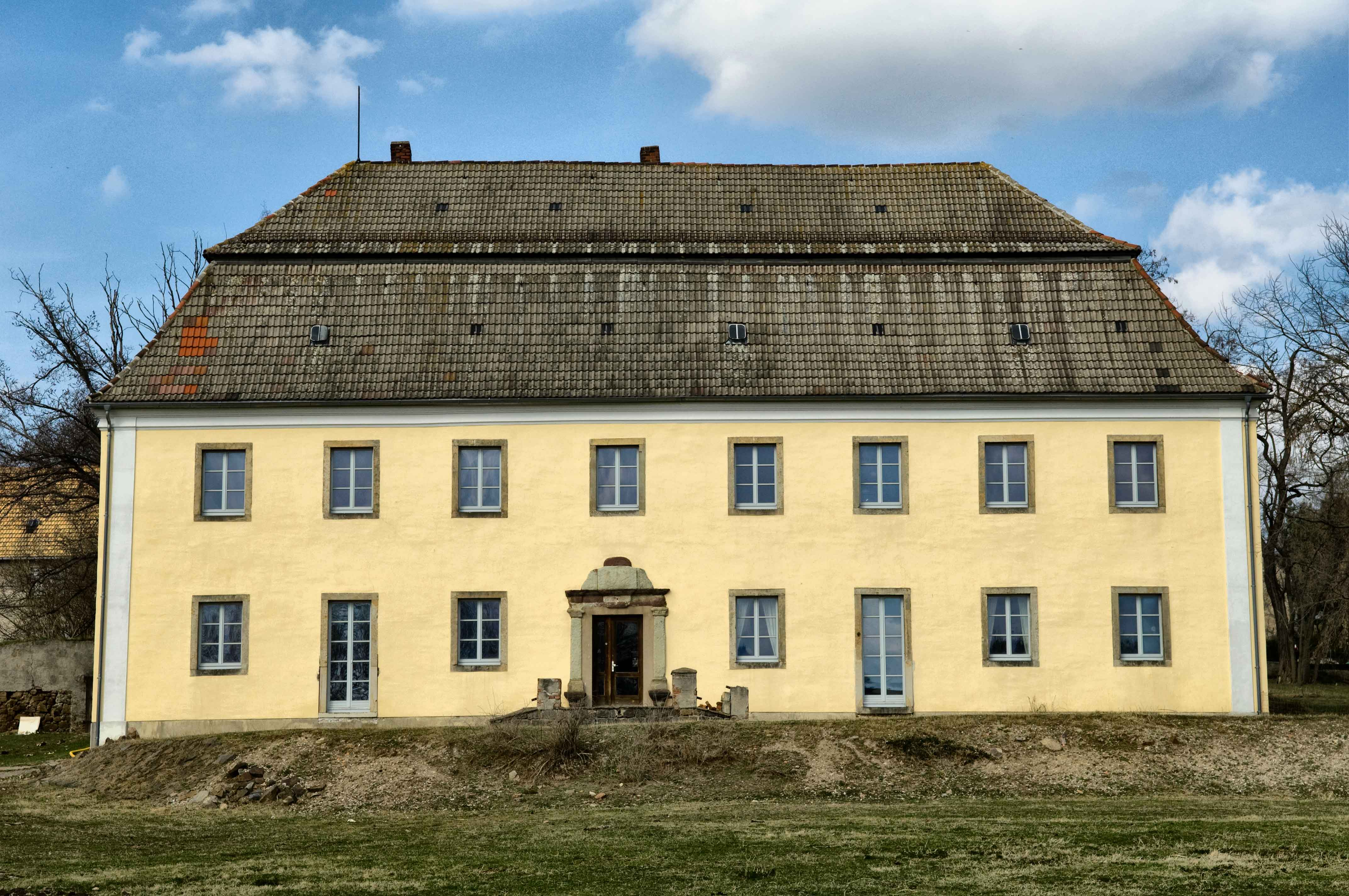 Ehemaliges Kammergut in Mahlis bei Wermsdorf